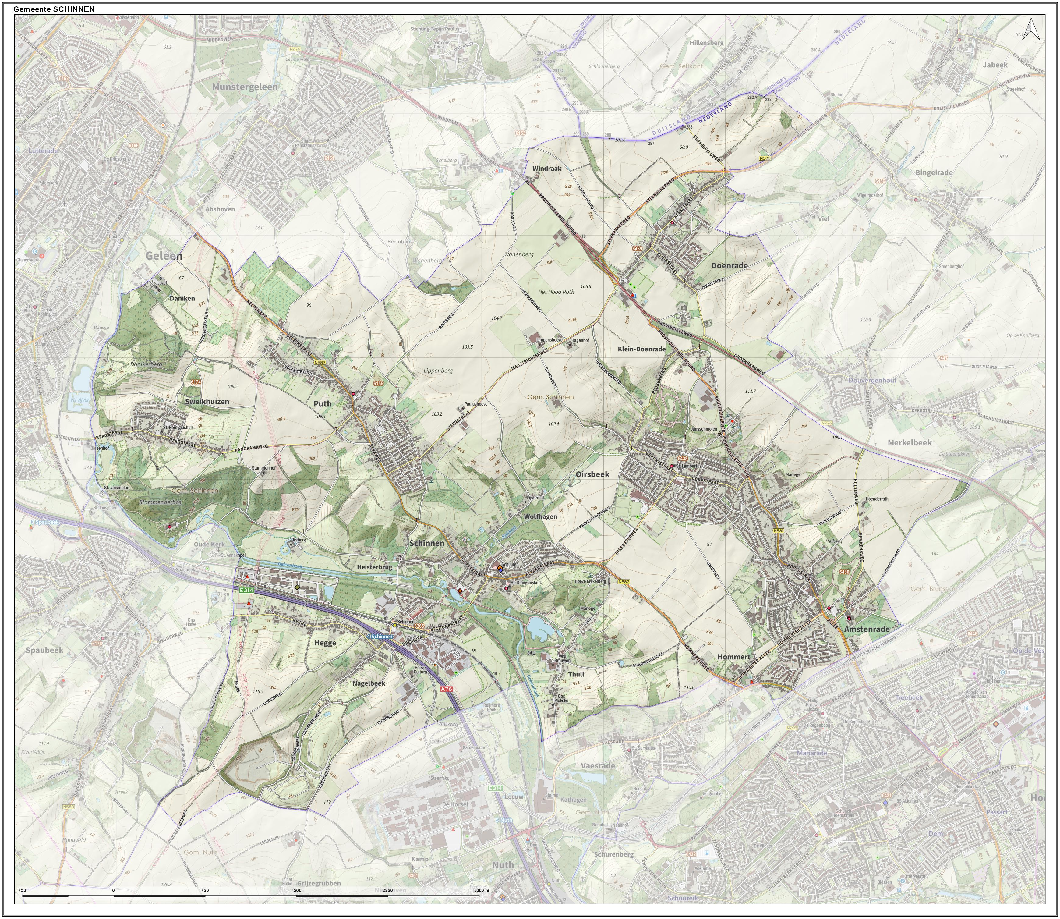 Topografische gemeentekaart. Resolutie: 400 pixels/km. Kaartbeeld samengesteld uit de open geodata van de Top10NL en Top25namen (Kadaster), Creative Commons-BY licentie. Gebouwvlakken uit open geodata BAG extract. Wegen uit de OpenStreetMap, OpenStreetMap community. Reliëfschaduw uit de Actuele Hoogtekaart AHN2. Samenstelling en kleurenschema: Jan-Willem van Aalst, met QGIS. Zie ook de Legenda.